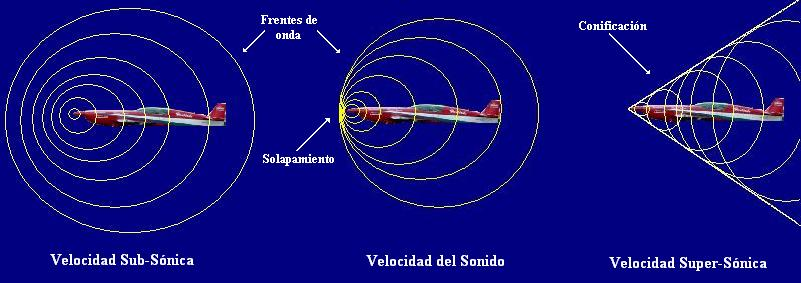 La imagen muestra el comportamiento de las ondas sonoras a velocidades subsónicas, sónicas y supersónicas.